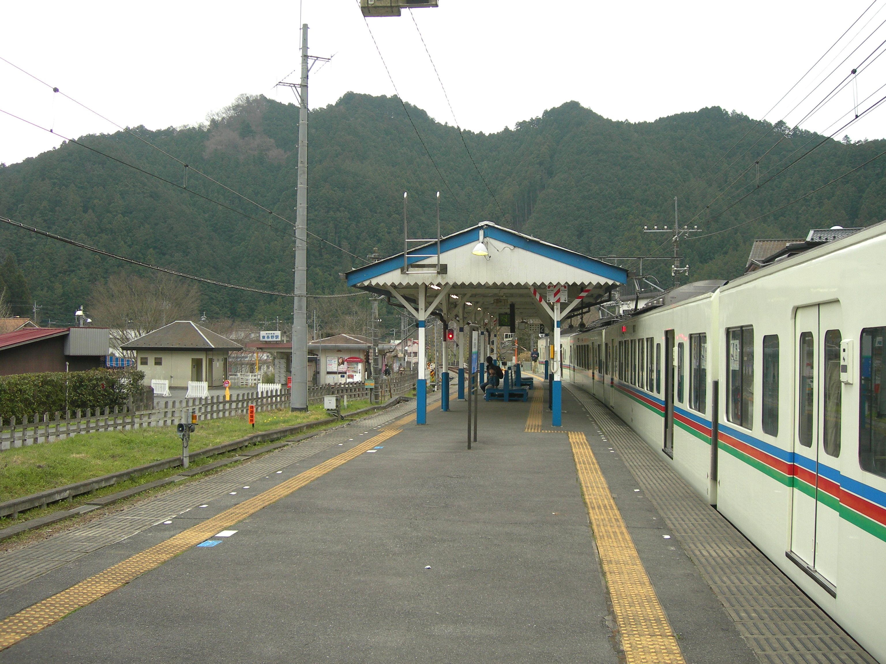 東吾野駅ホーム